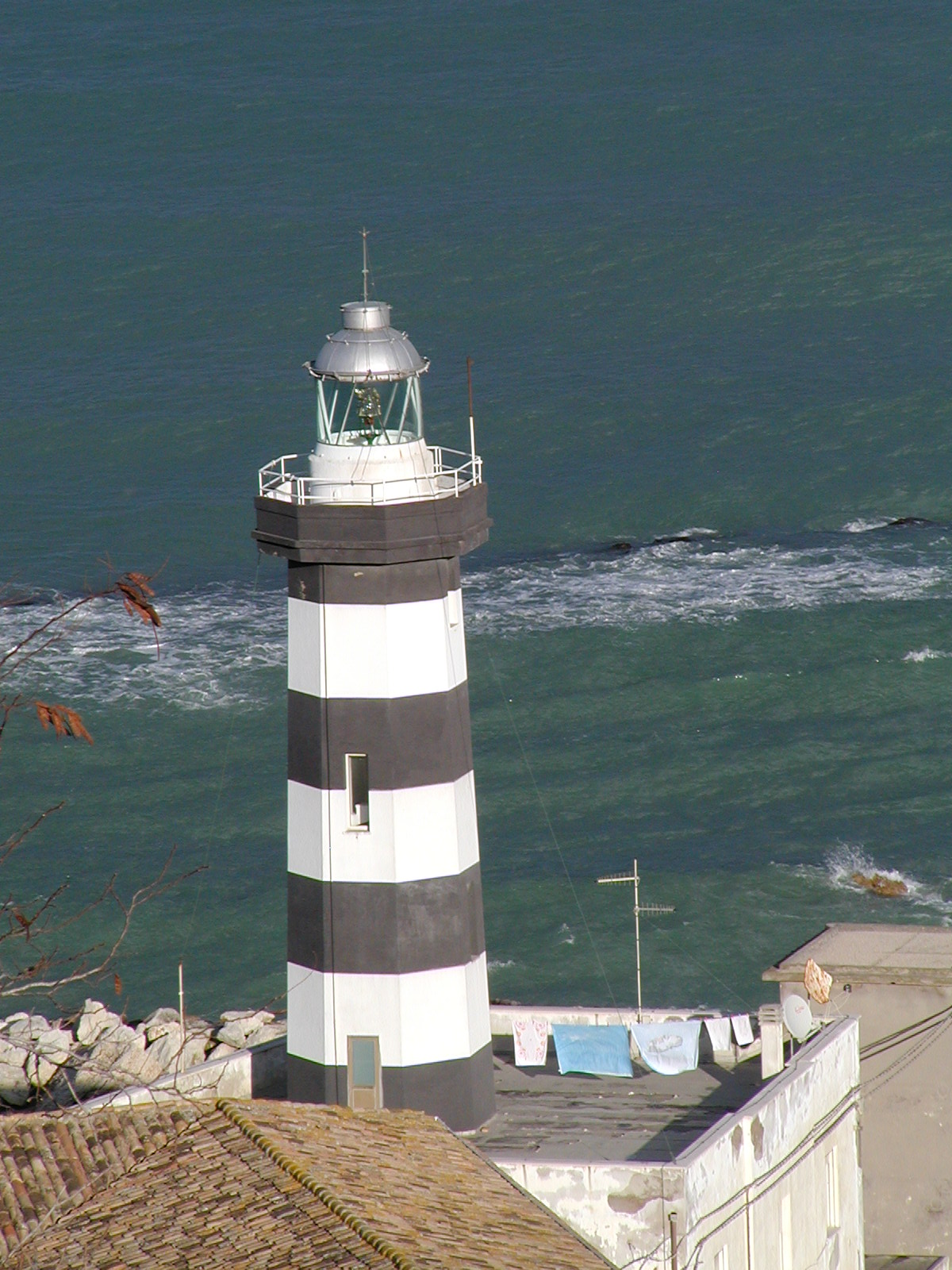 Die kleine Leuchtturm